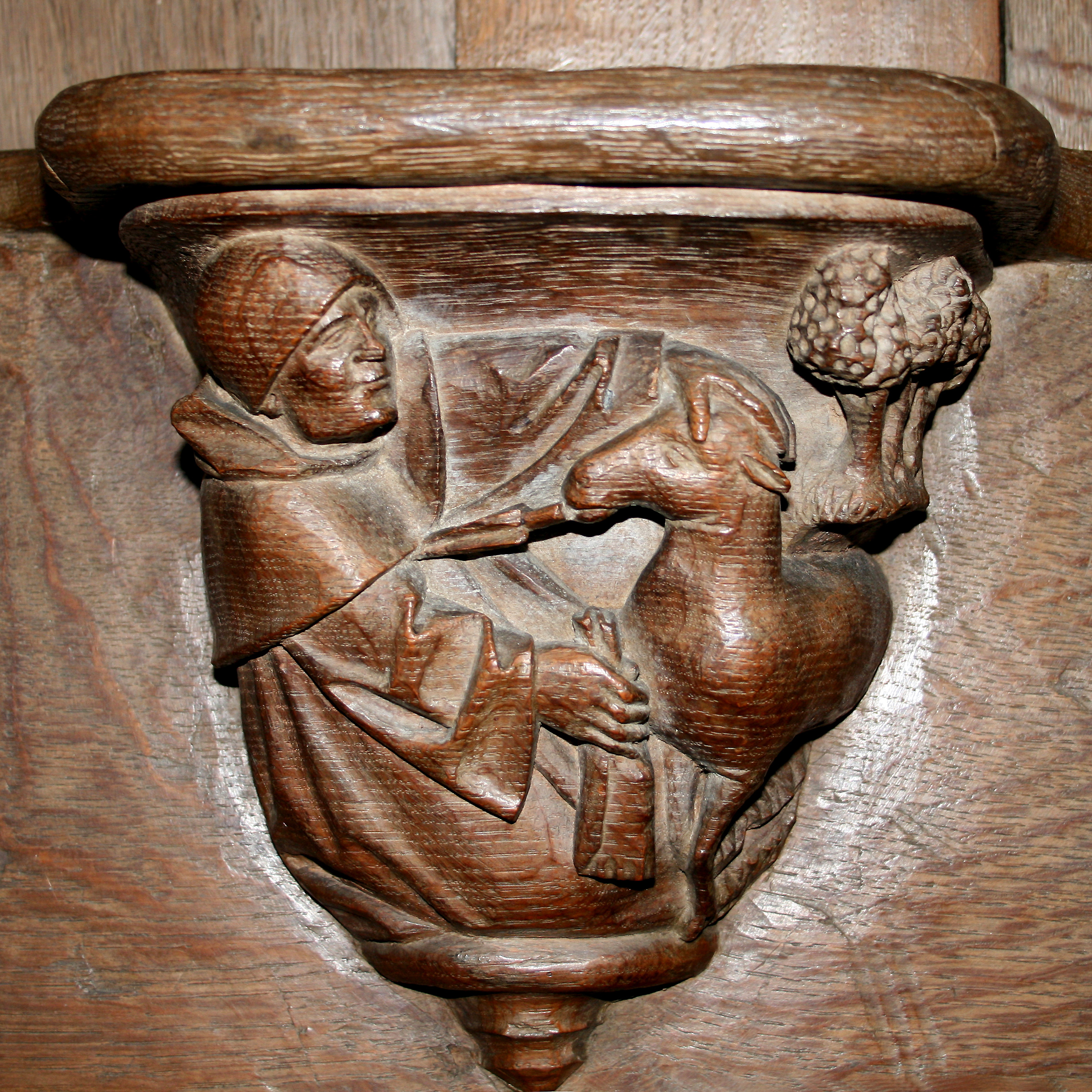 Miséricorde représentant « Le moine et l’agneau ». - Stalles de la Basilique Saint-Materne (XVIe siècle) - Walcourt (Belgique).